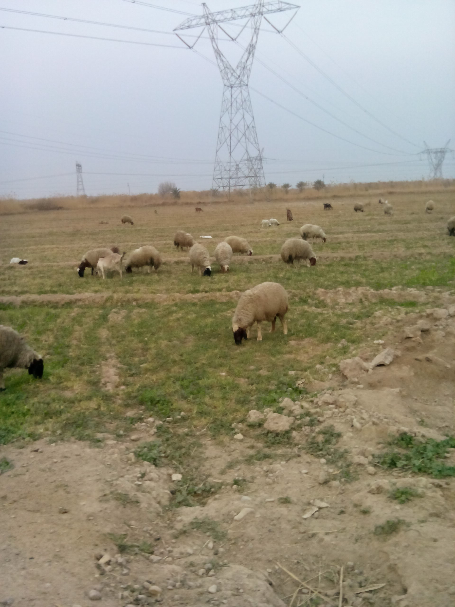 مجموعة من الاغنام تأكل العشب في قضاء الخالص بمحافظة ديالى شرق العراق